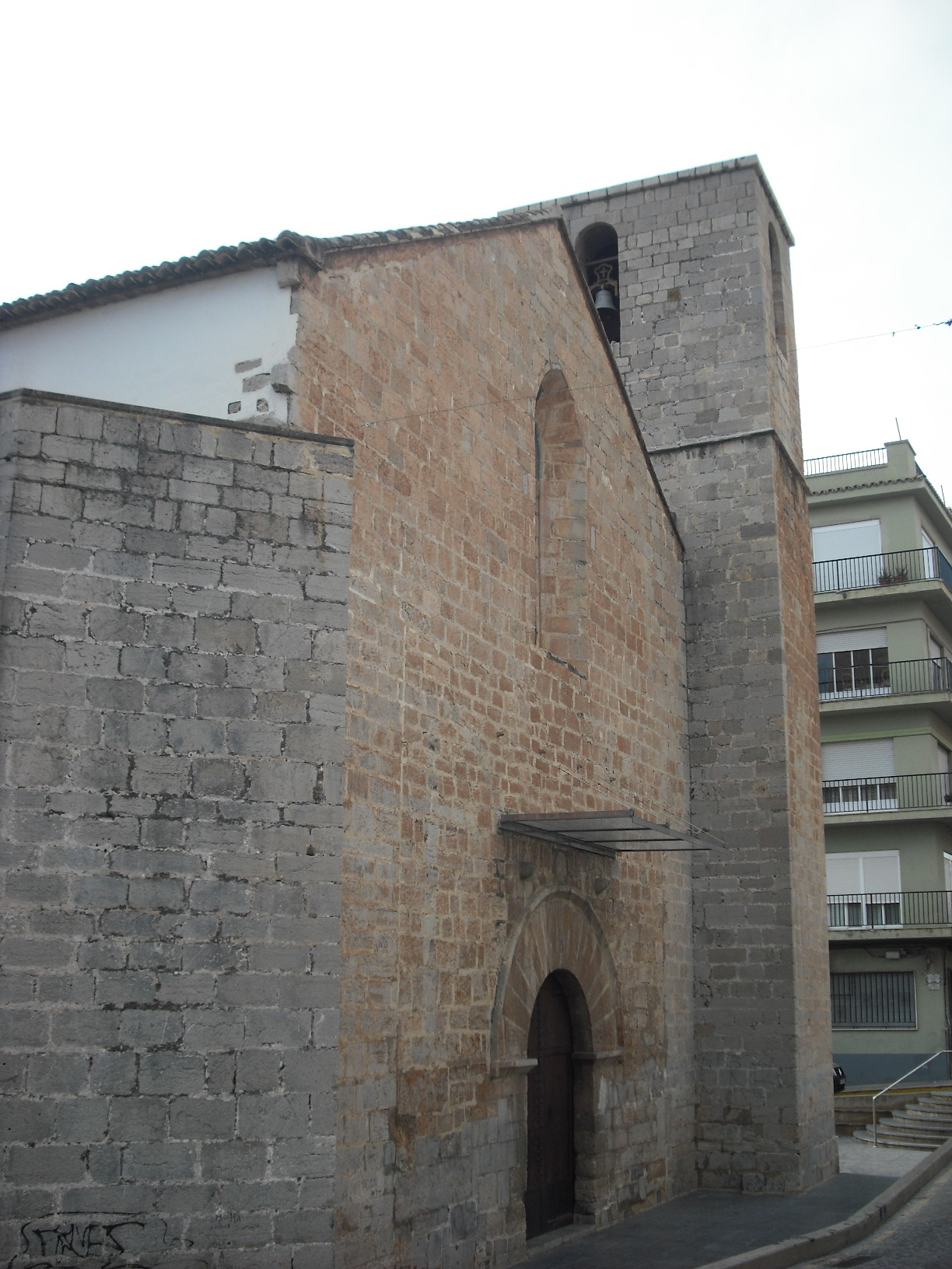 Façana de l'església de El Salvador de Sagunt.